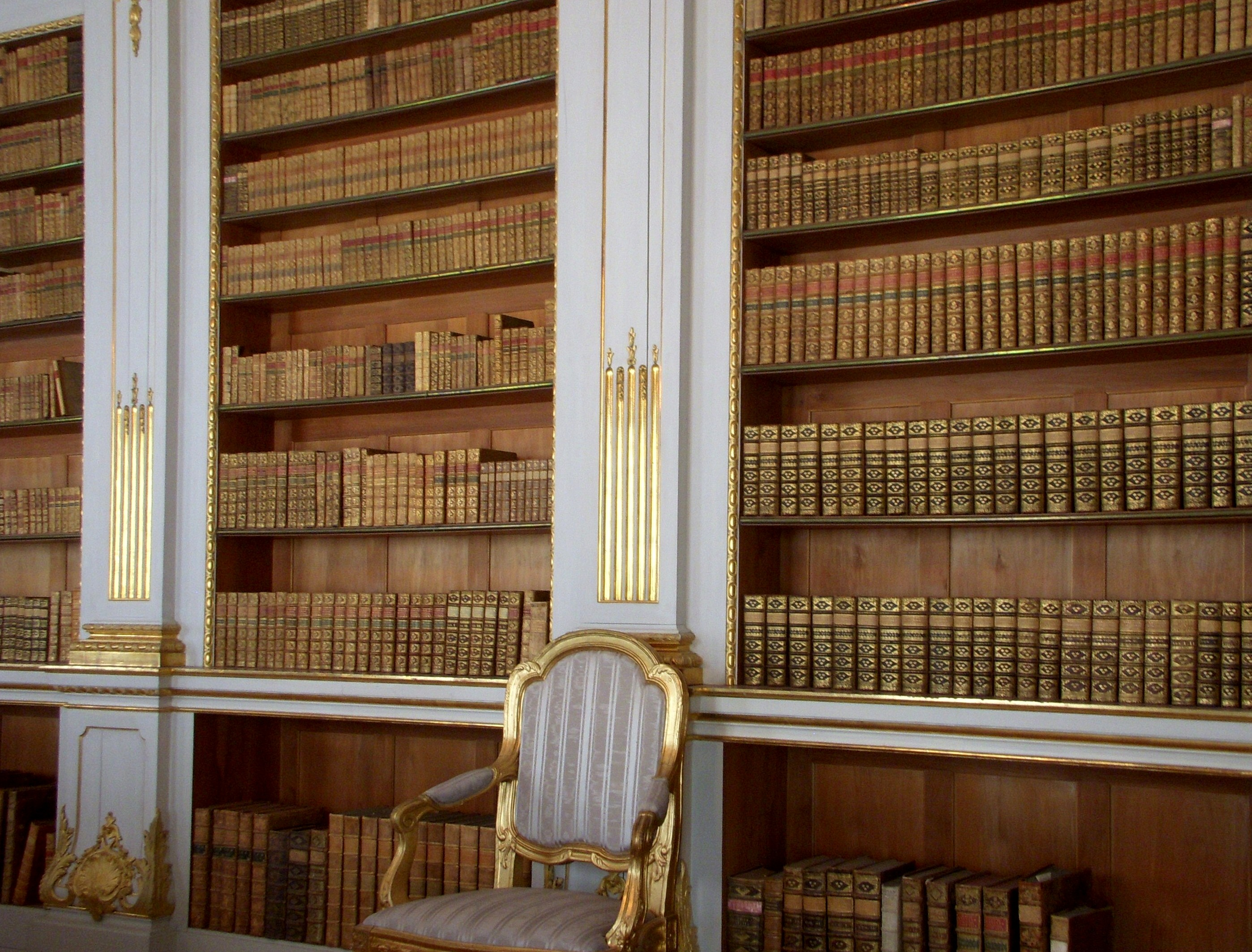 Drottningholms slottsbibliotek, detalj